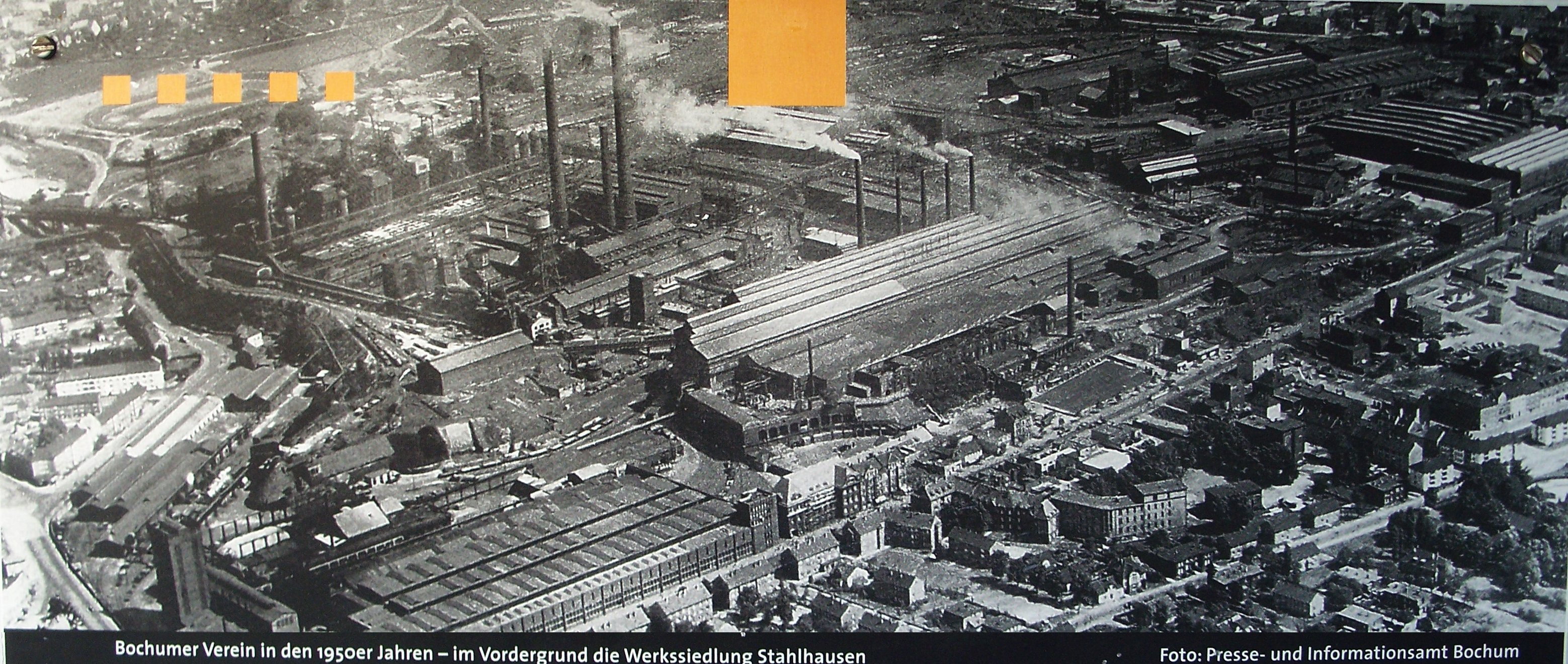 Luftbild des Bochumer Vereins, Werk Gußstahlfabrik, in den 1950ern.